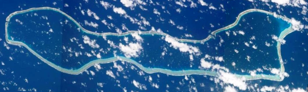 NASA image